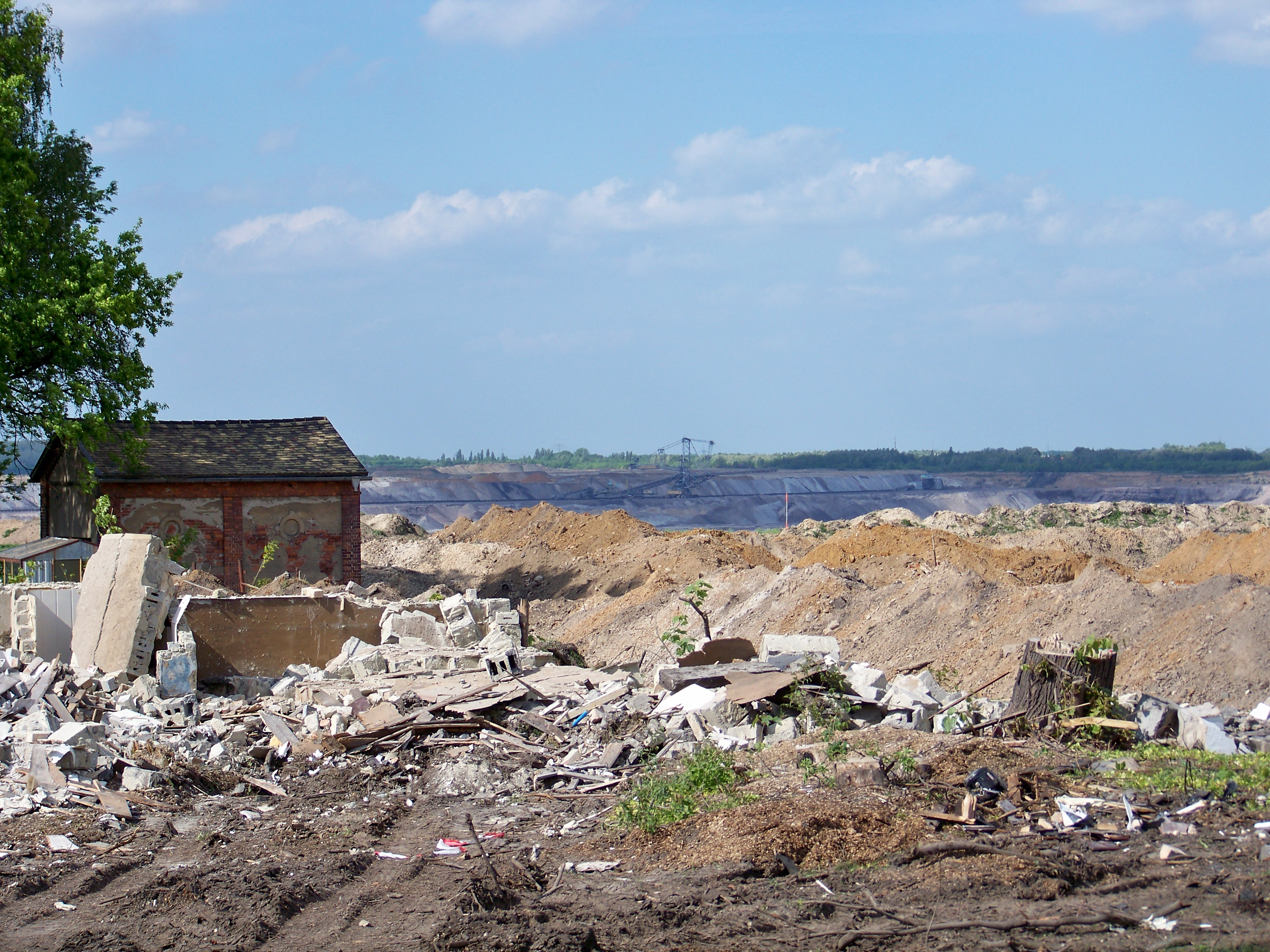 Der Braunkohletagebau nähert sich dem abgerissenen Ort Heuersdorf.